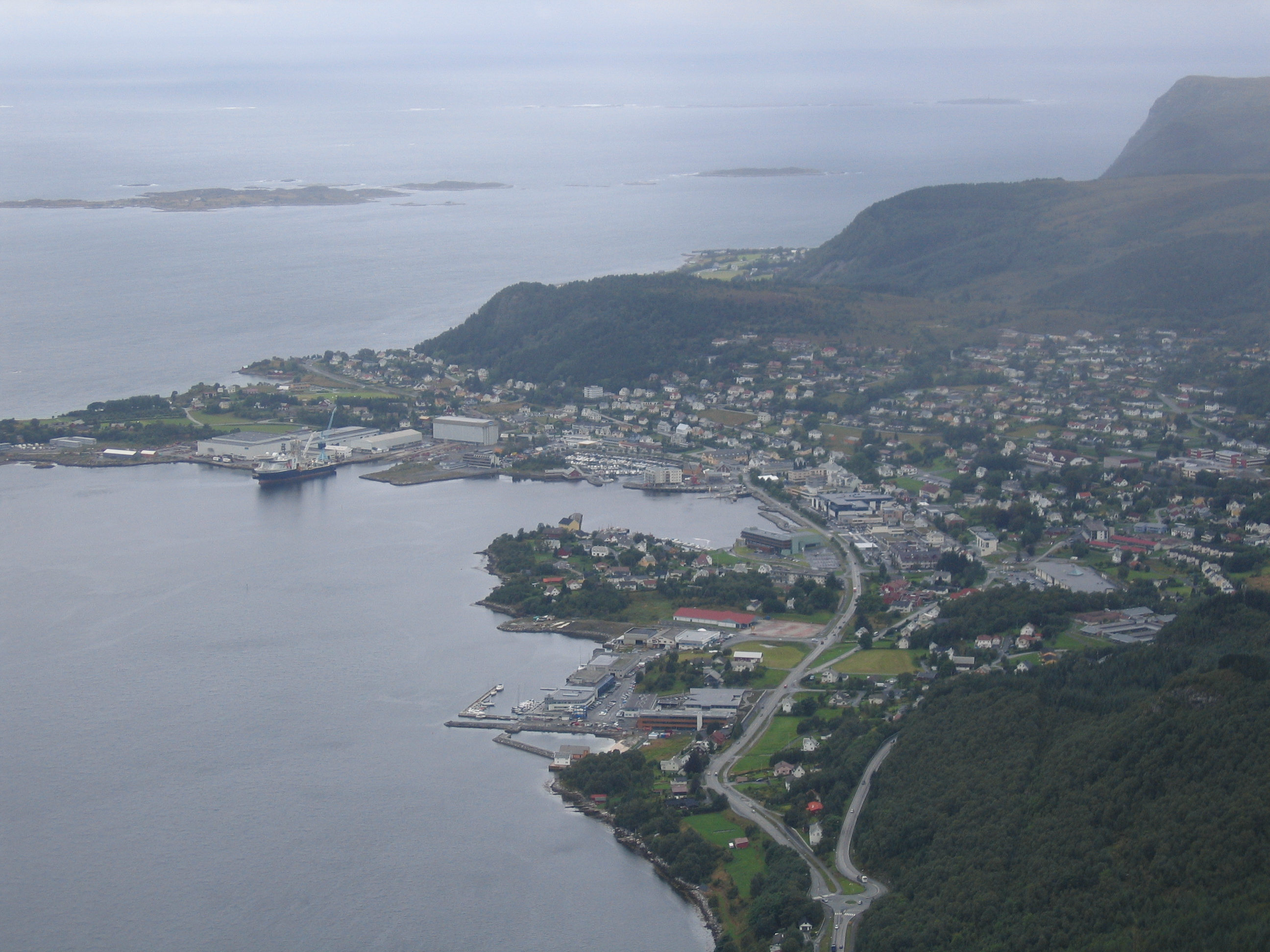 Ulsteinvik sett frå Hasundhornet